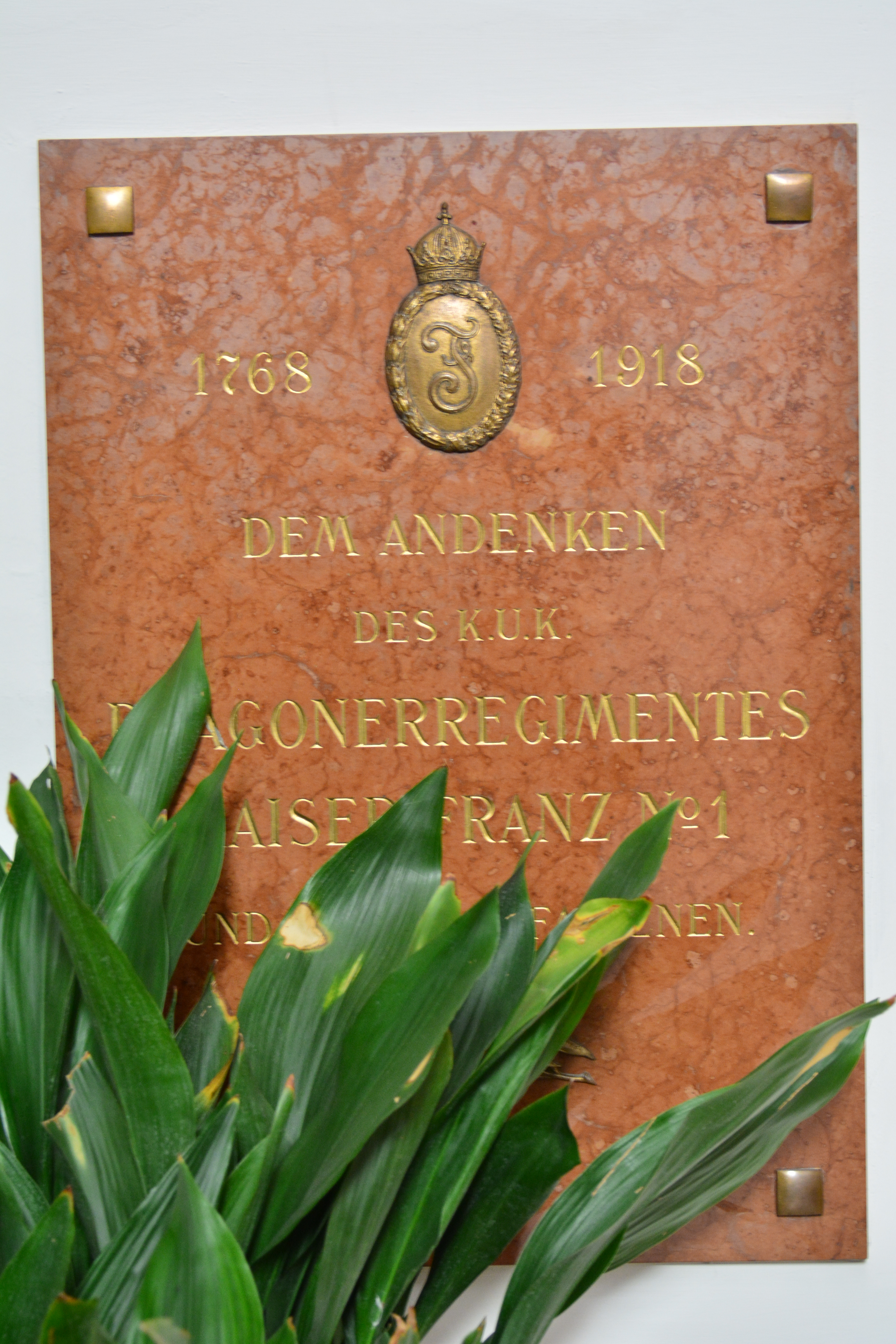 Gedenktafel für das k.u.k. Dragonerregiment Nr. 1 (Wien, Neuer Markt, Kapuzinerkirche)